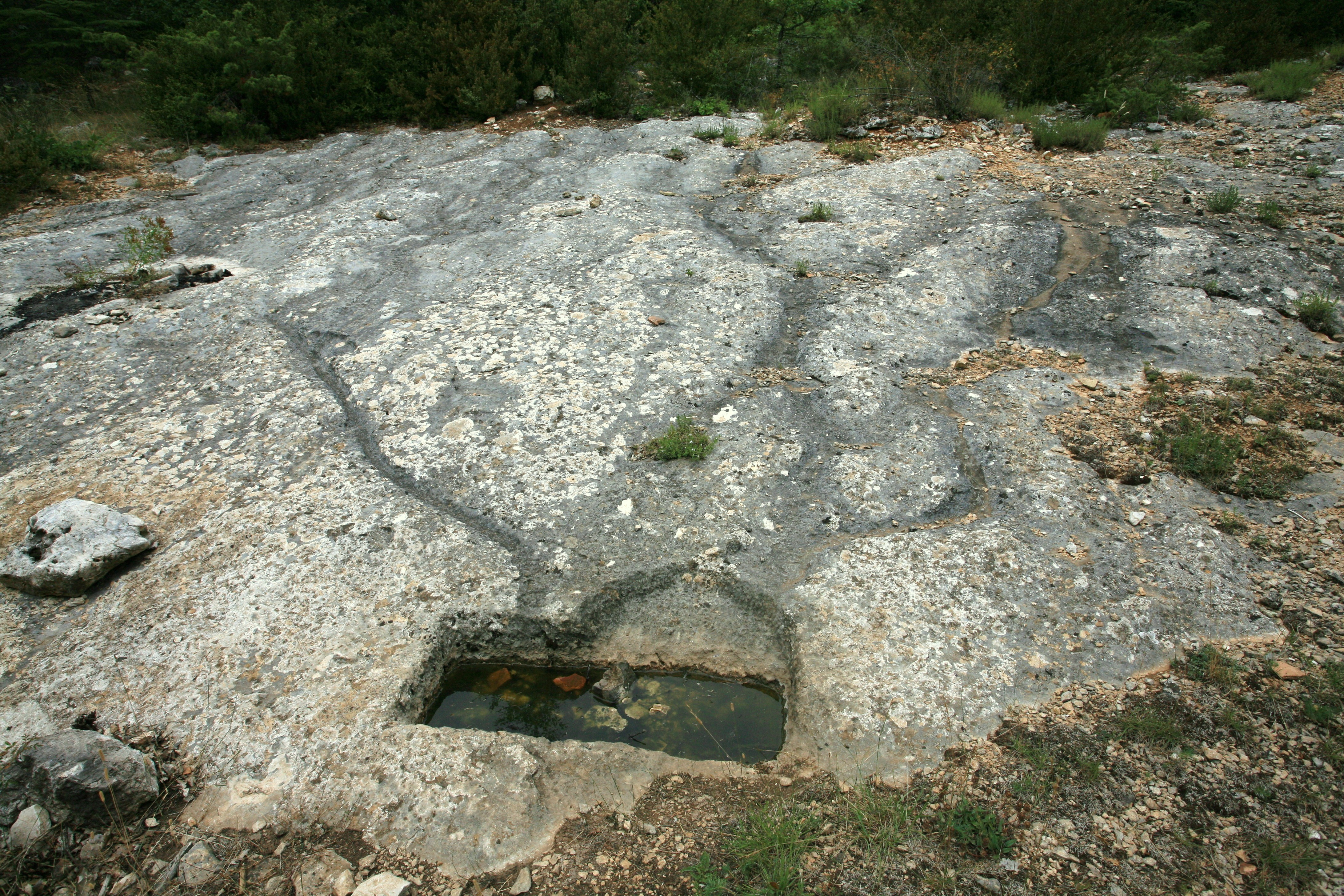 Aiguier sur le mont Ventoux, versant sud. Son impluvium est nettement visible car le rocher est dégagé.